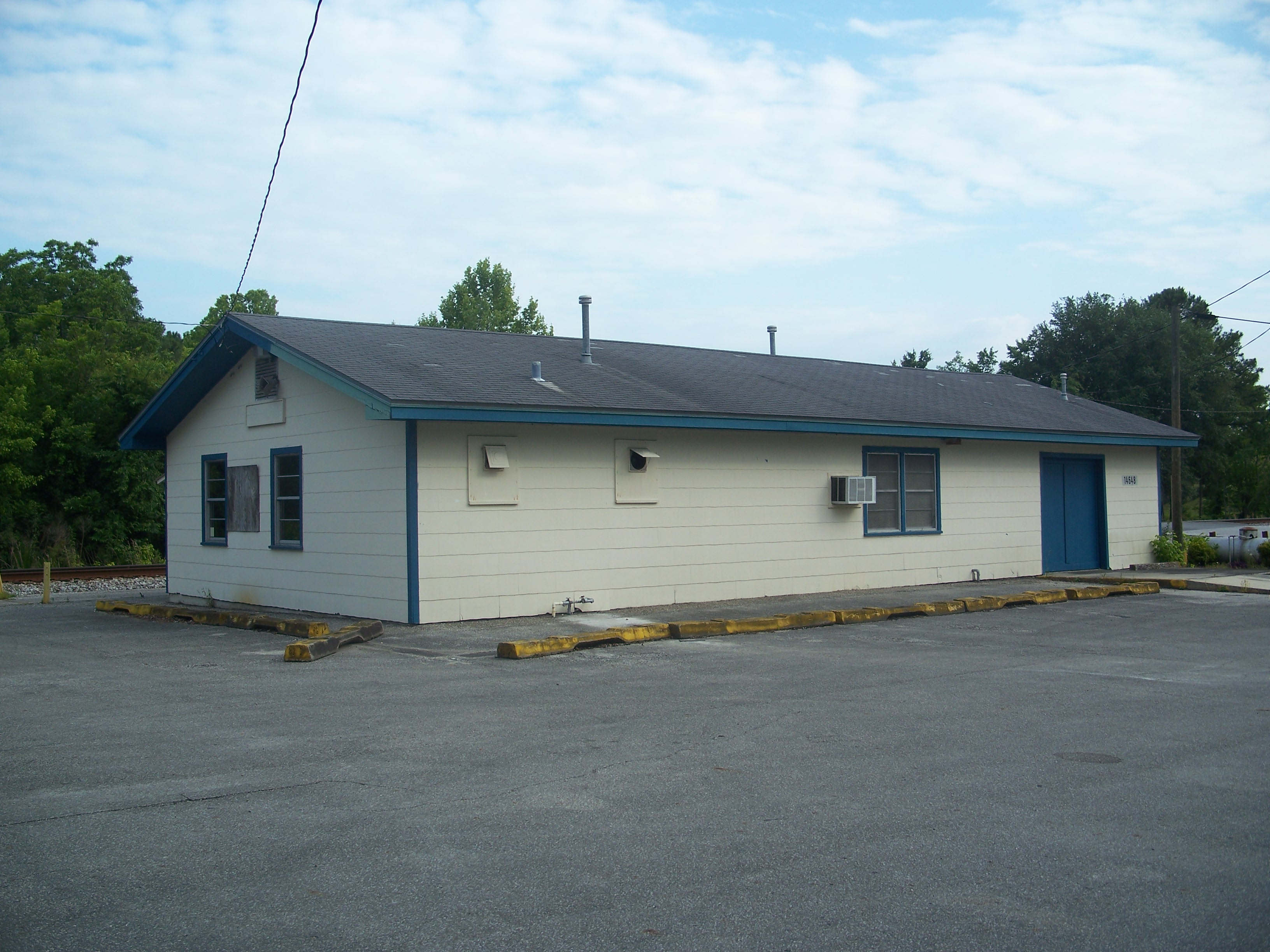 Waldo, Florida: Amtrak station